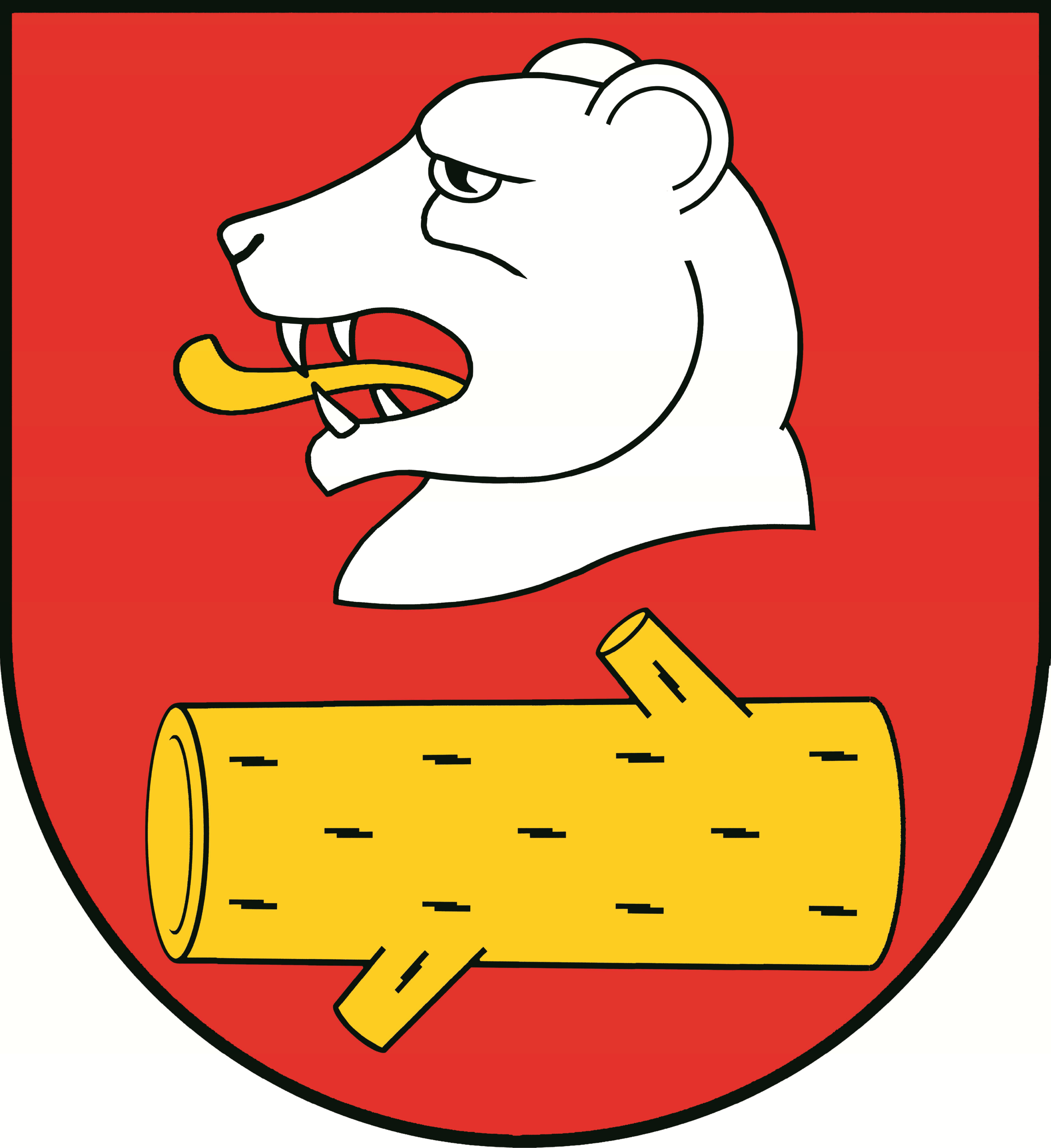 Herb gminy Radzyń Podlaski.